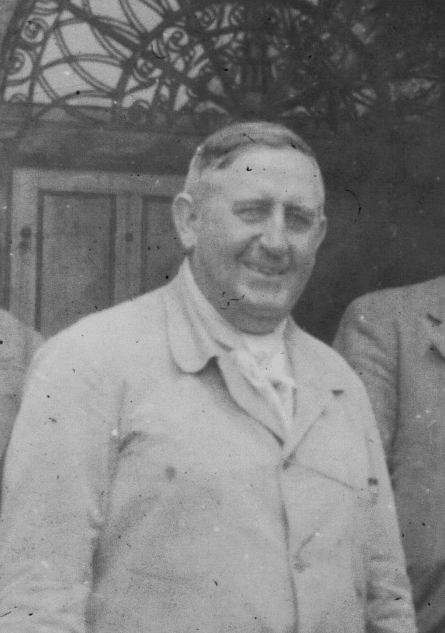 Alberto Boerger (56 años)